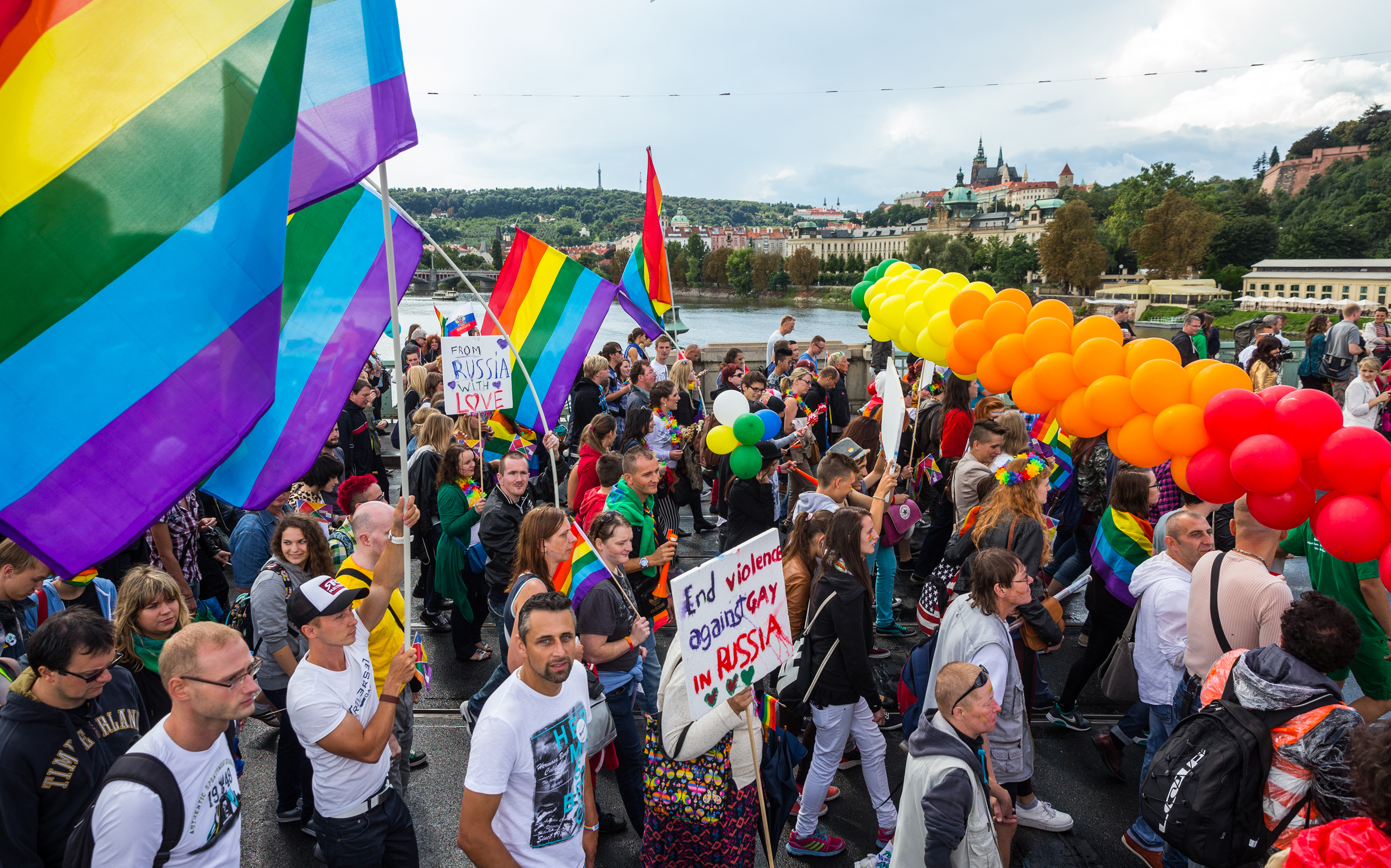 Prague Pride 2014, průvod na Čechově mostu